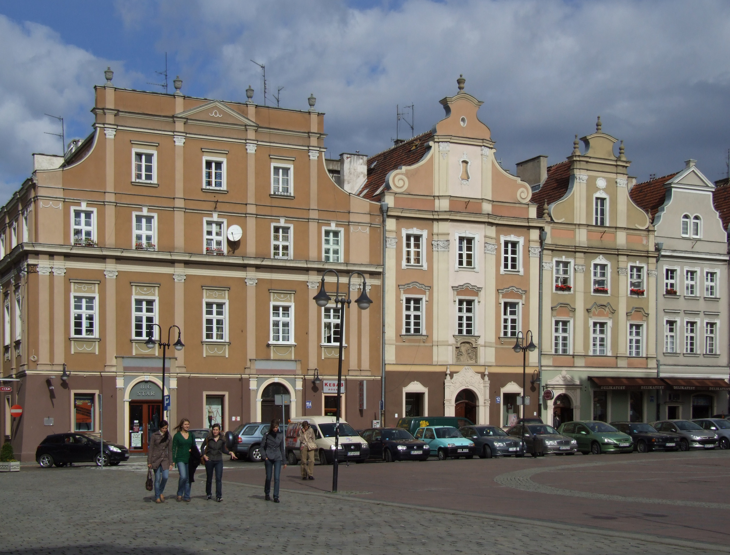 Zabytkowe kamienice na rynku w Opolu